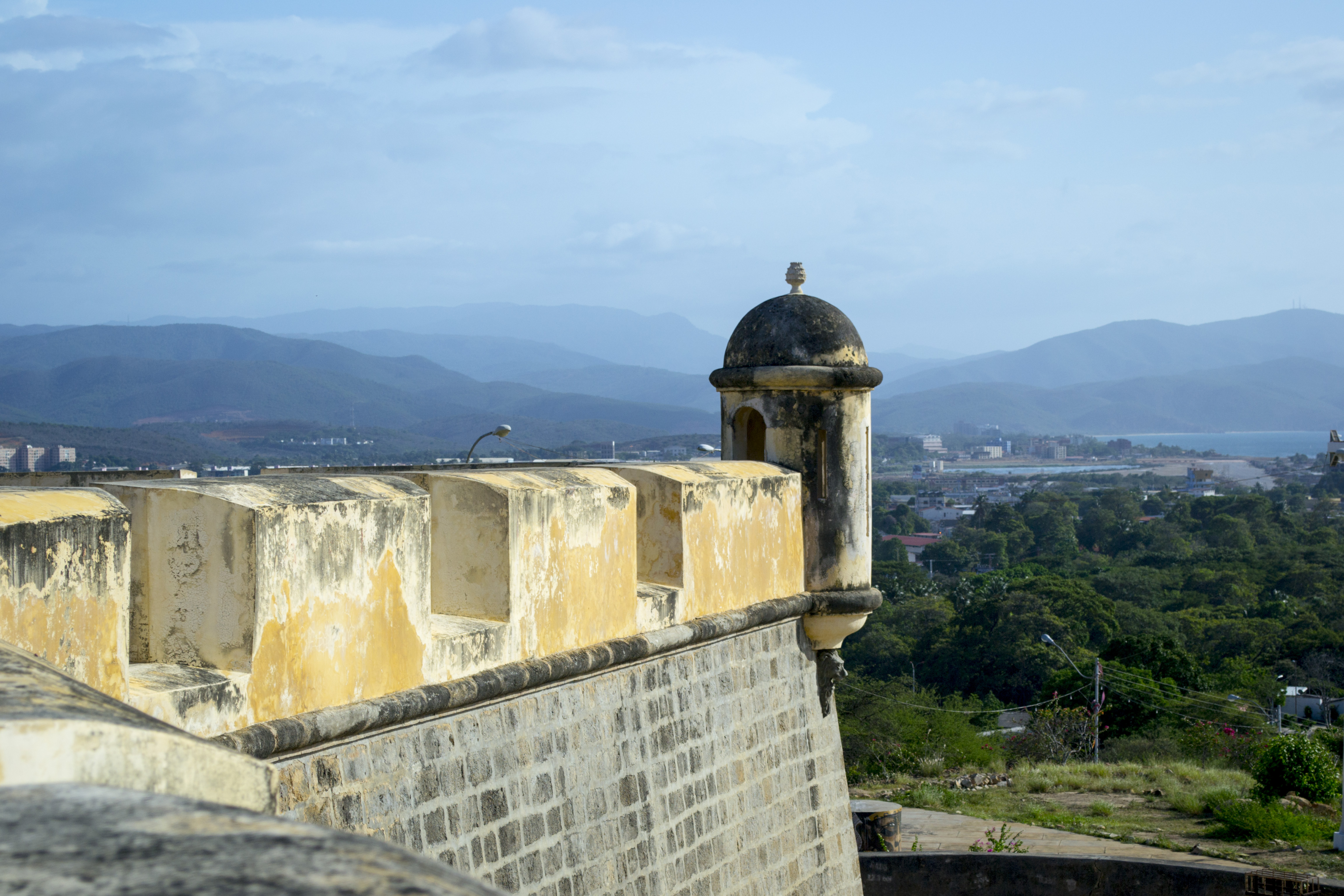 Fundación de Cumaná - Castillo San Antonio de la Eminencia